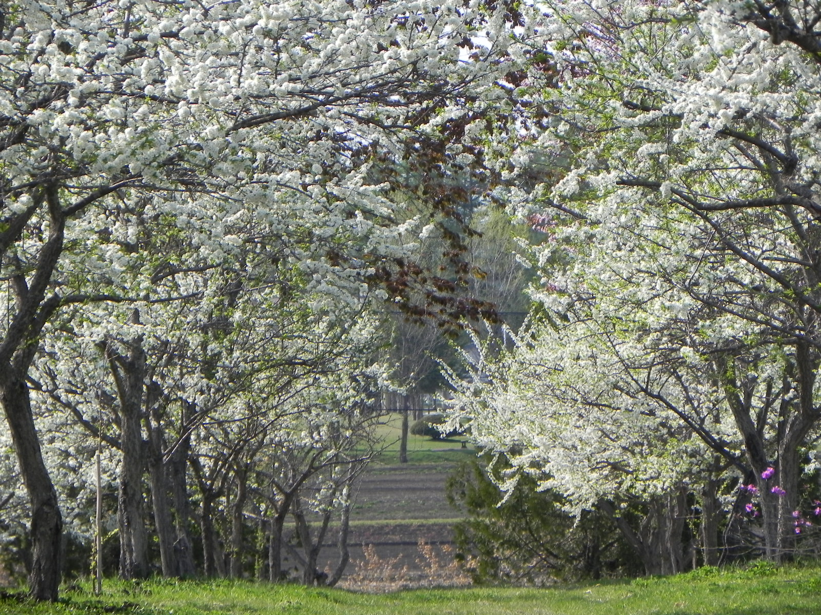 更別すももの里